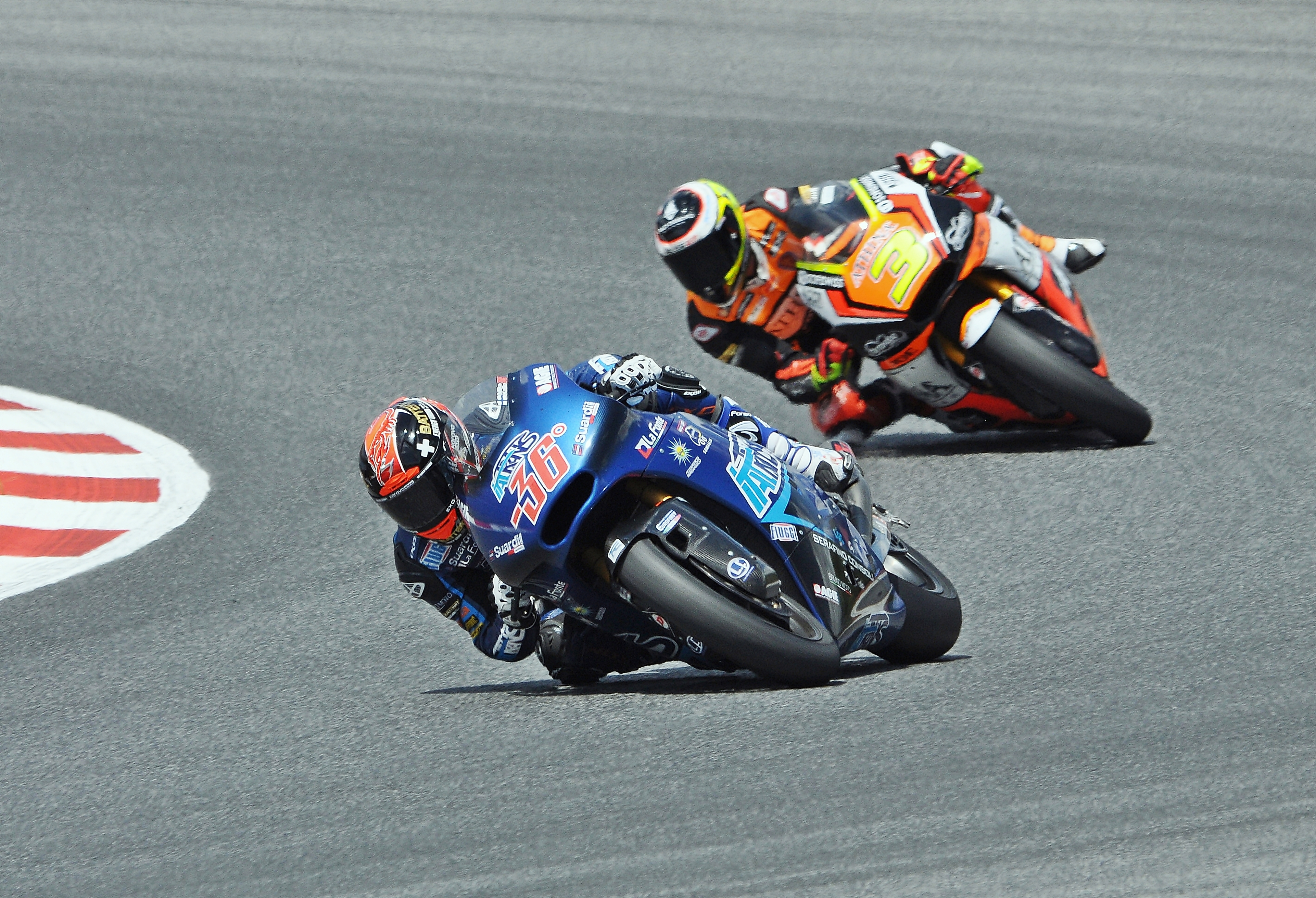 gran premio de cataluña